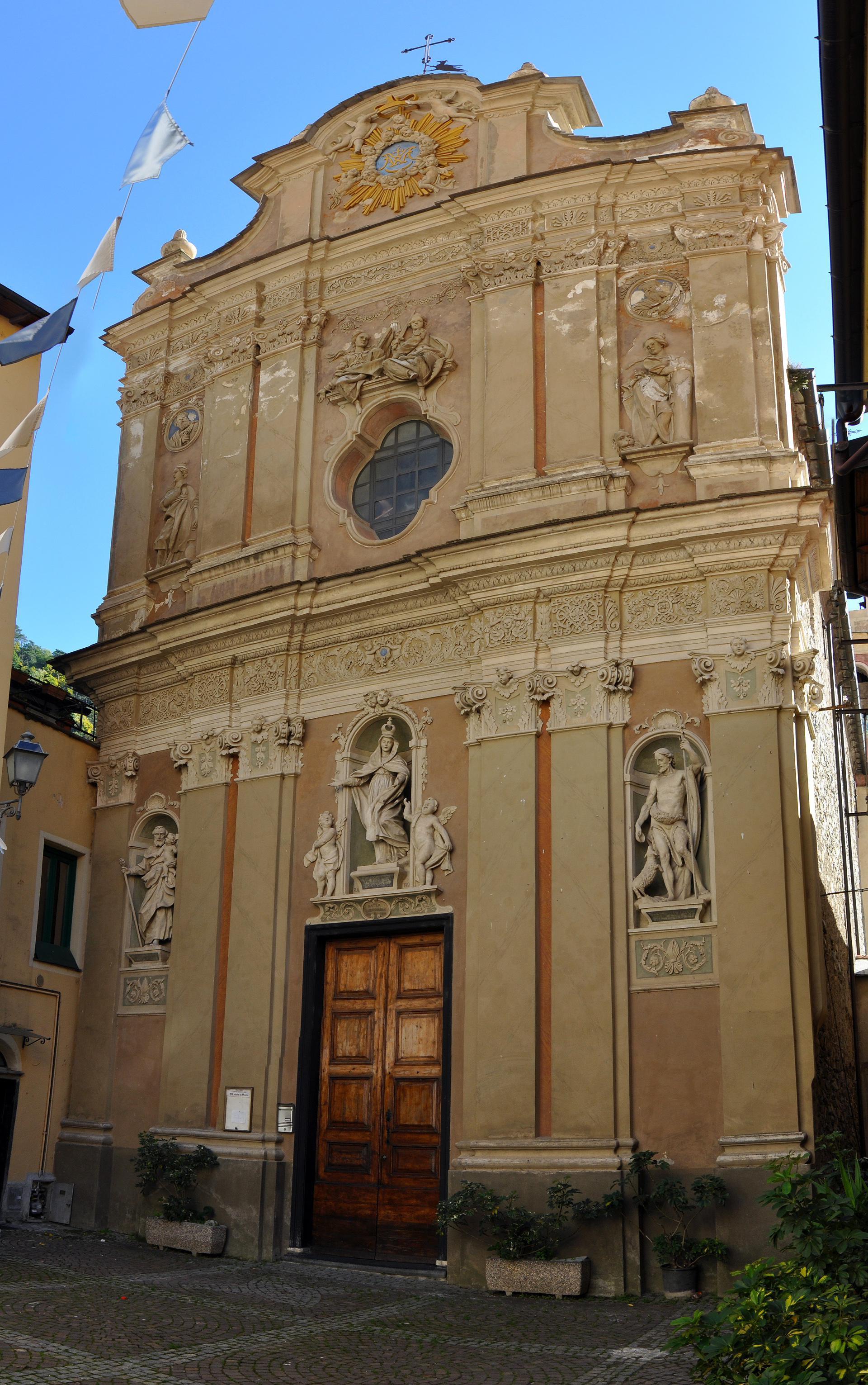 Chiesa di Nostra Signora dell'Assunta e di San Giorgio di Badalucco (IM) - Italia, novembre 2015